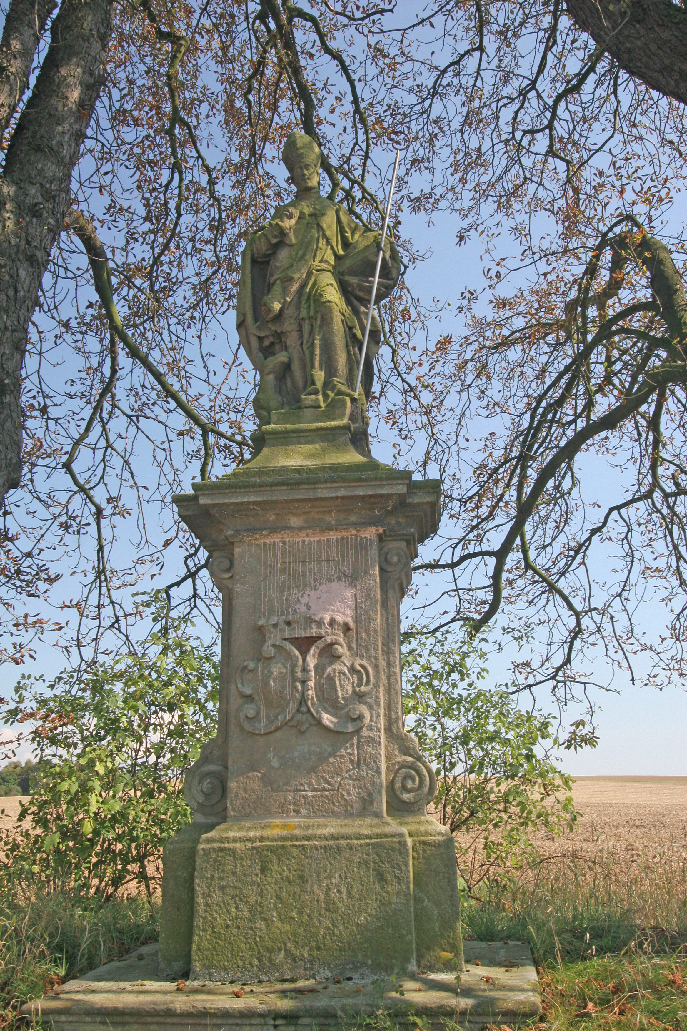 Socha svatého Jiljí, při cestě na Sebuč, Miskolezy.